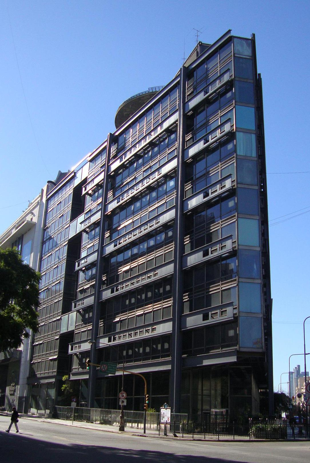 Edificio Teniente General Castiñeiras, construido para Sociedad Mixta Siderúrgica Argentina (SOMISA) y actual sede de la Jefatura de Gabinete de Ministros de la Nación.